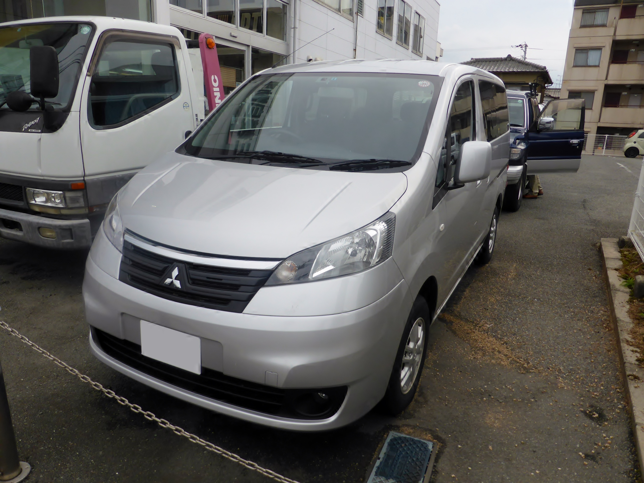 BM20型三菱・デリカバンをフロントから撮影。